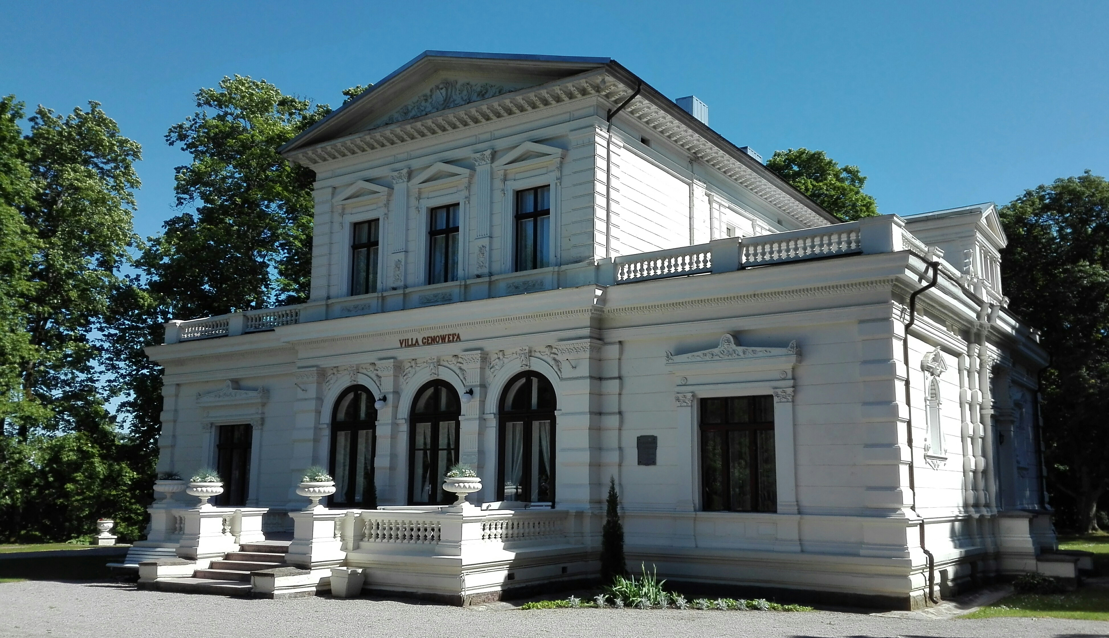 Švėkšnos dvaras